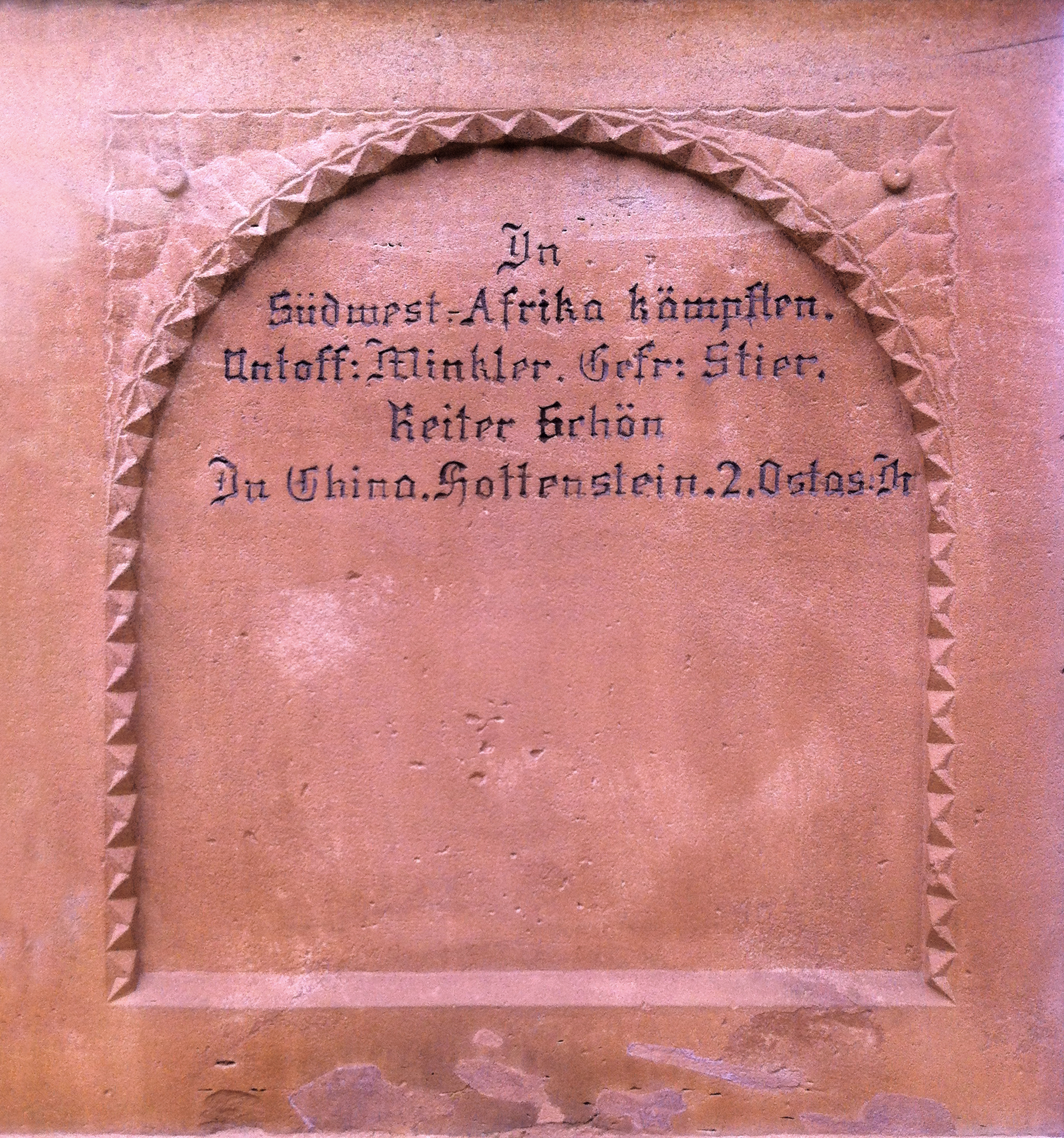 Kriegerdenkmal Eschelbronn